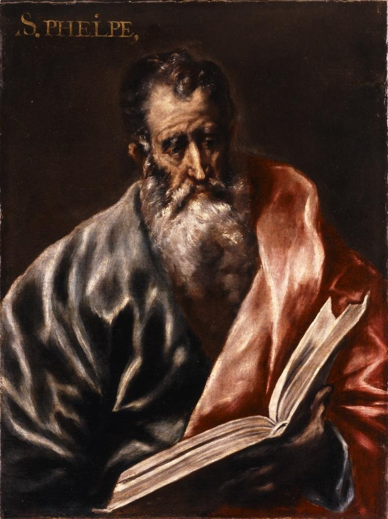 La obra representa al apóstol San Mateo, que también fue uno de los cuatro Evangelistas. Y aunque la inscripción colocada en la parte superior del lienzo identifica al personaje con el apóstol San Felipe, la mayoría de los autores coinciden en la actualidad en que el representado es San Mateo.